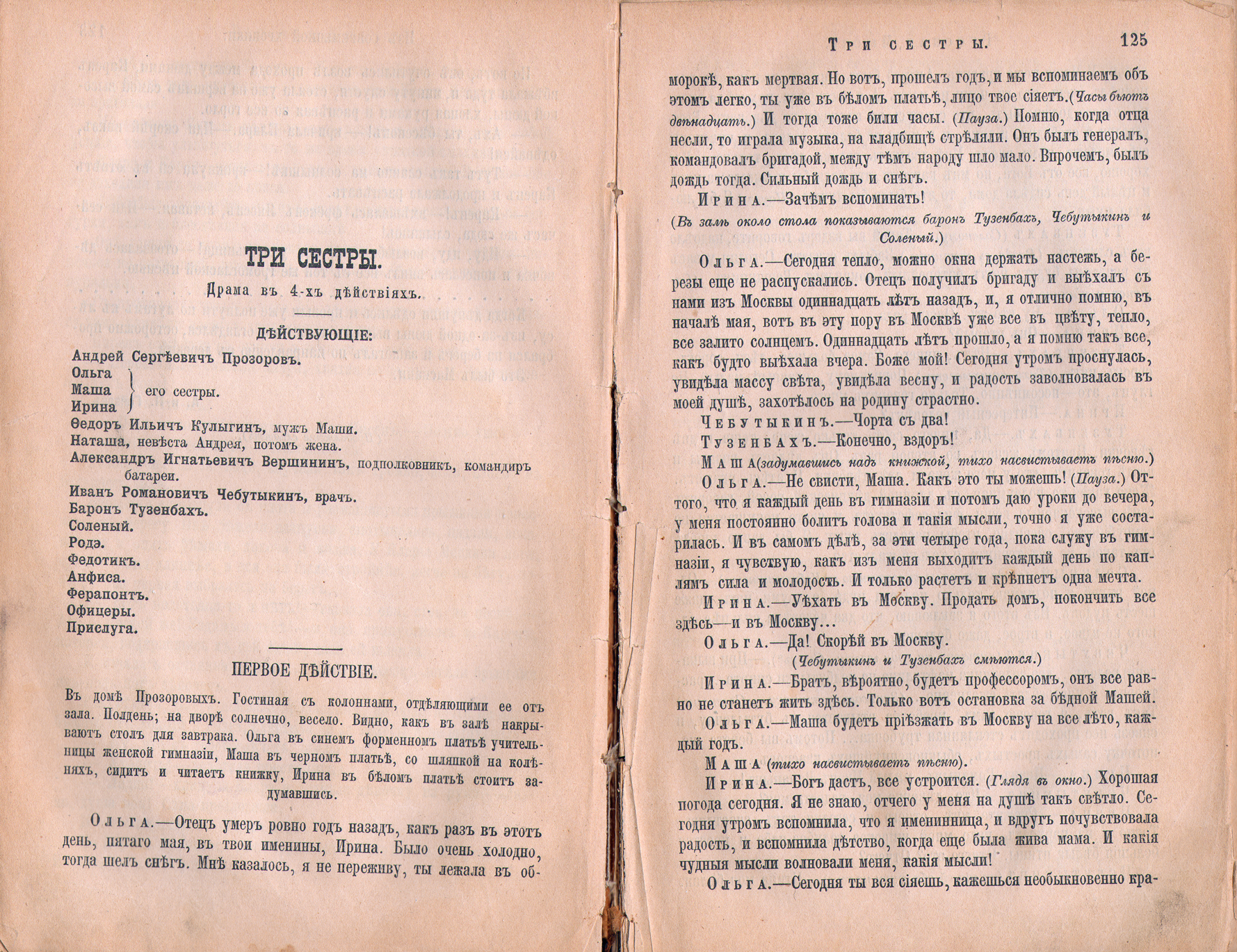 "Три сестры" А.П. Чехова. Первая публикация в журнале "Русская мысль", февраль, 1901 г.